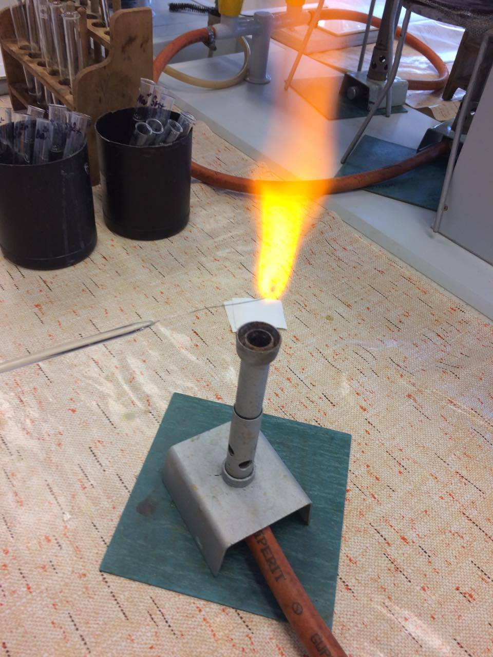 Fotografie z hodiny Laboratorního cvičení analytické chemie Střední průmyslová škola chemická Pardubice